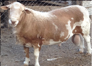 Borrego Katahdin